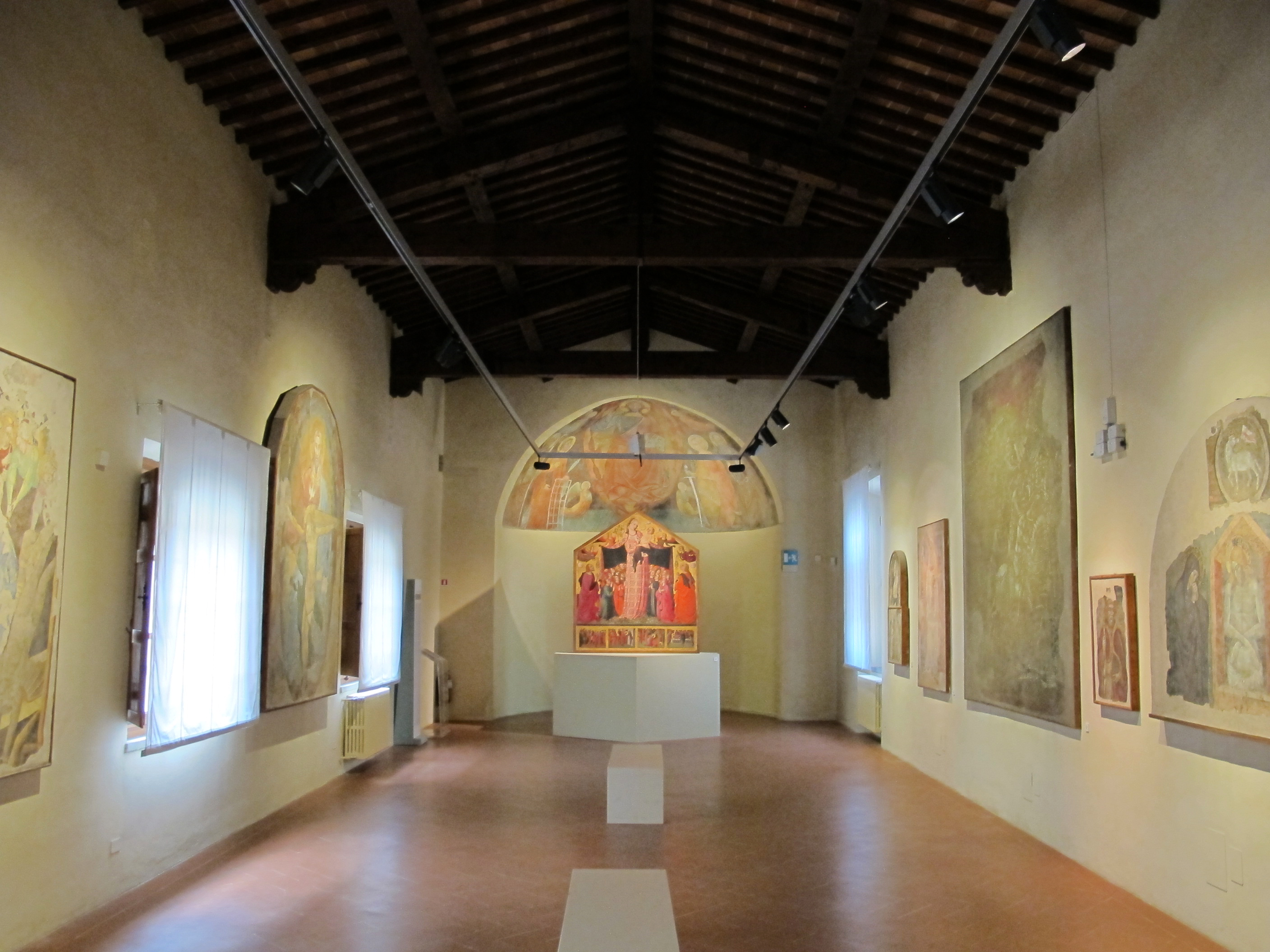 Museo Nazionale d'Arte Medievale e Moderna - MIBAC This is a photo of a monument which is part of cultural heritage of Italy.